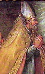 Asti, Ex voto 1677, Confraternita della Trinità.Part.Sant'Evasio